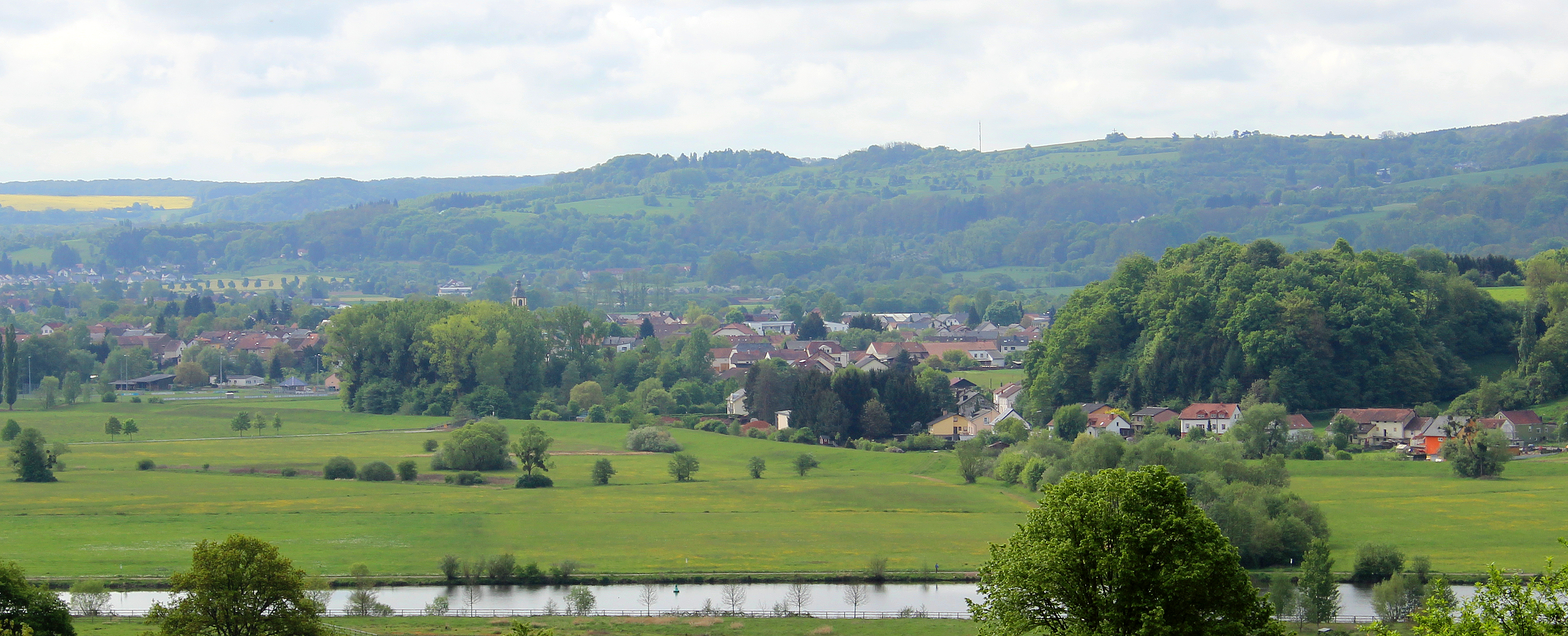 Schwemlingen, Stadt Merzig, Landkreis Merzig-Wadern, Saarland